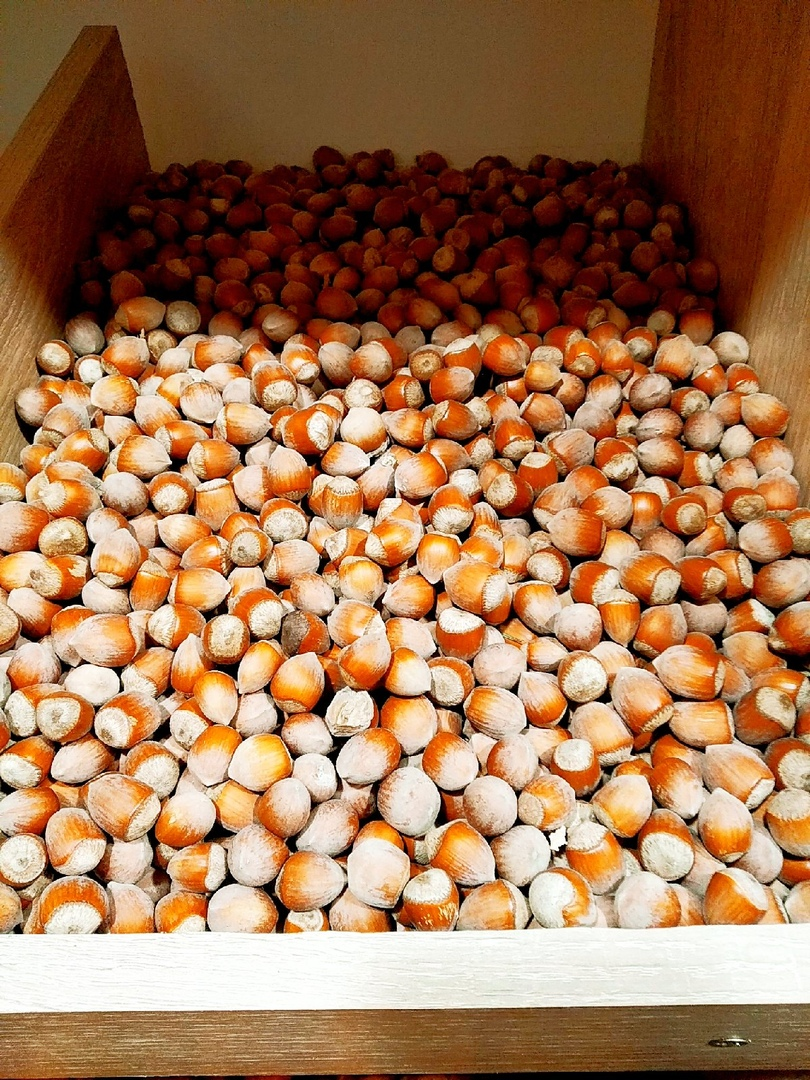 Татарча/tatarça: Фундук. Рәсем 2019 елда Яшел Узен шәһәрендә эшләнгән.